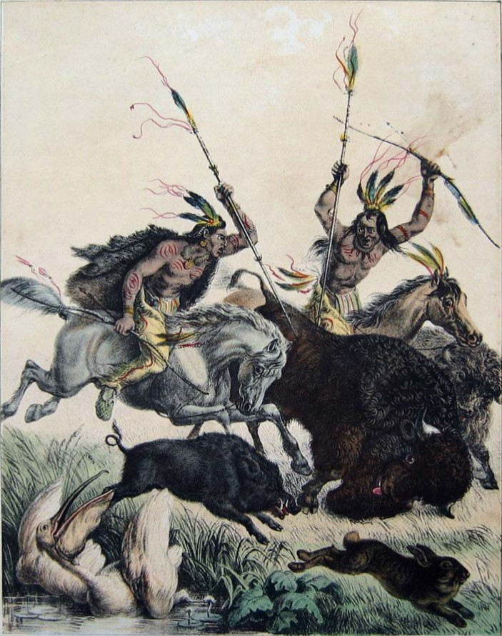 Česky: Ze světa divočiny (barevná litografie na papíře; 21,5×17 cm)